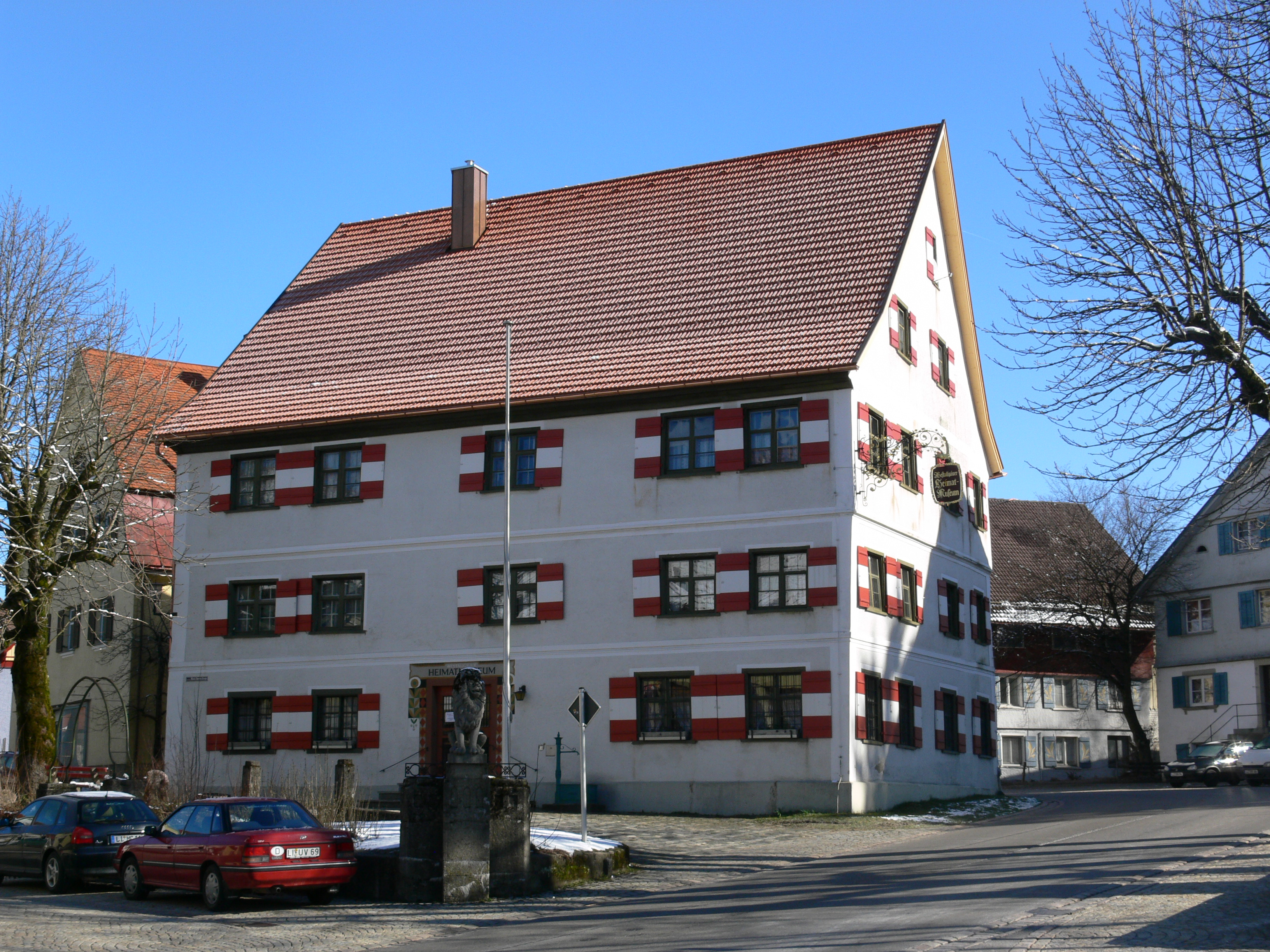 Westallgäuer Heimatmuseum, Weiler, Gde. Weiler-Simmerberg, Landkreis Lindau, Bayern